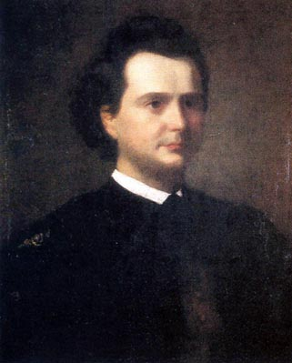 László József magyar színész.